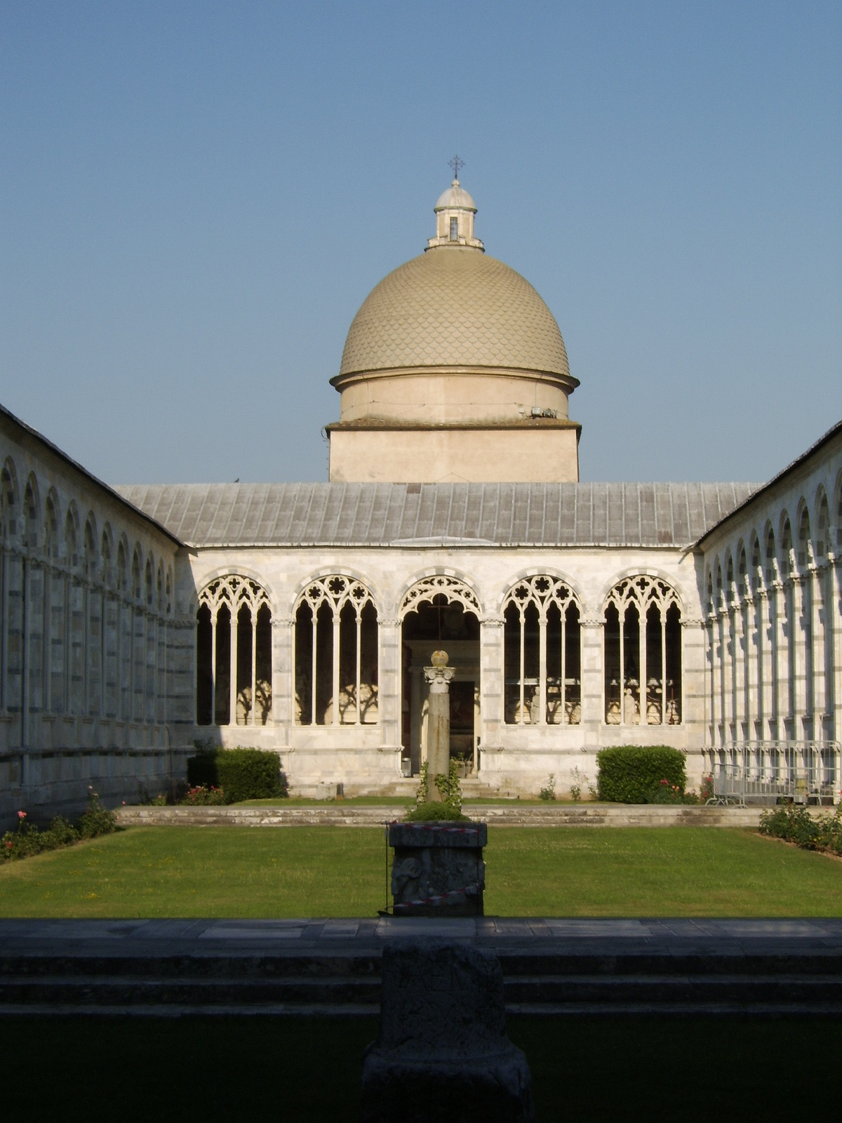 Pise, cour intérieure du Campo Santo.